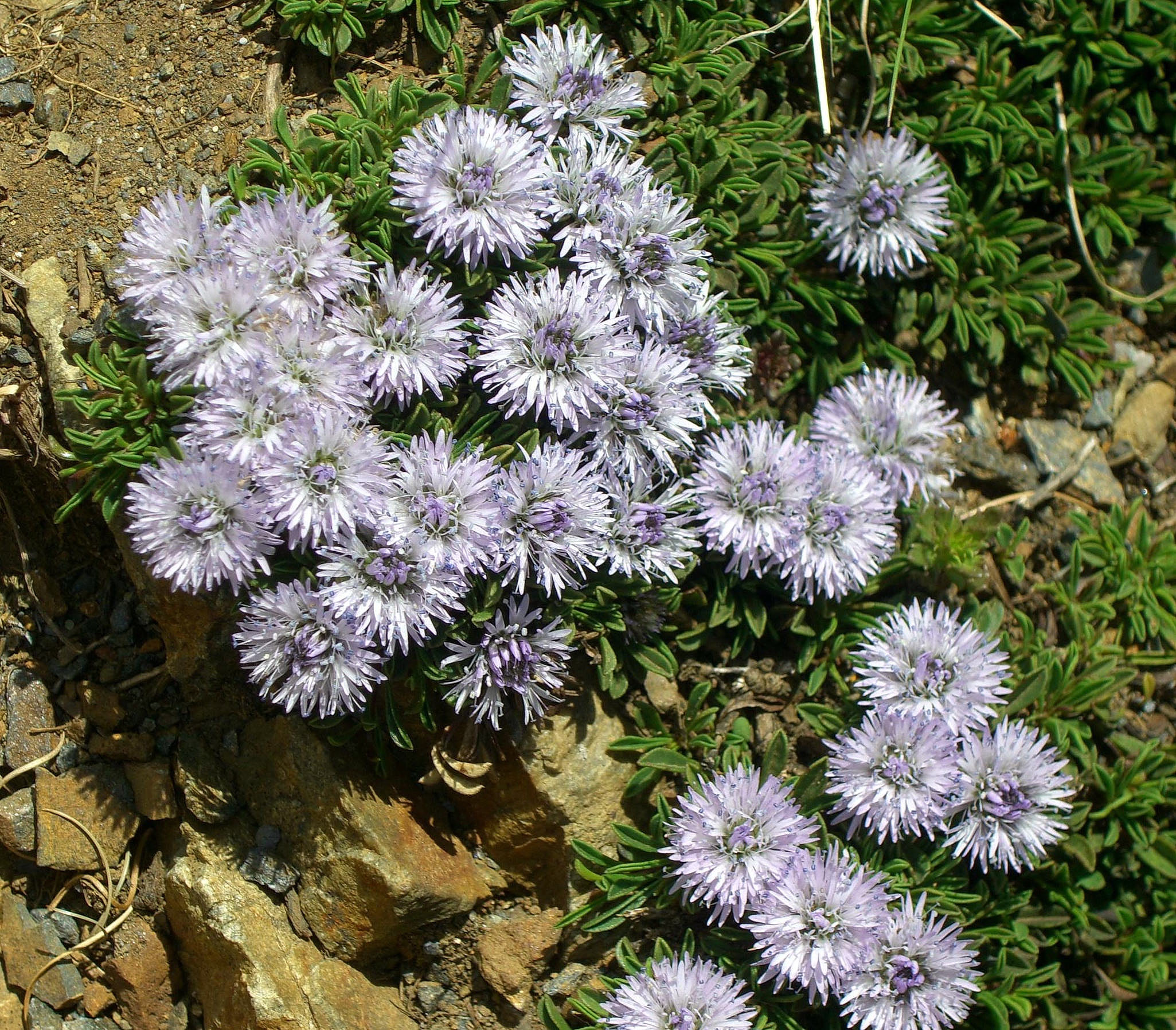 Herzblättrige Kugelblume (Globularia cordifolia ssp. repens)